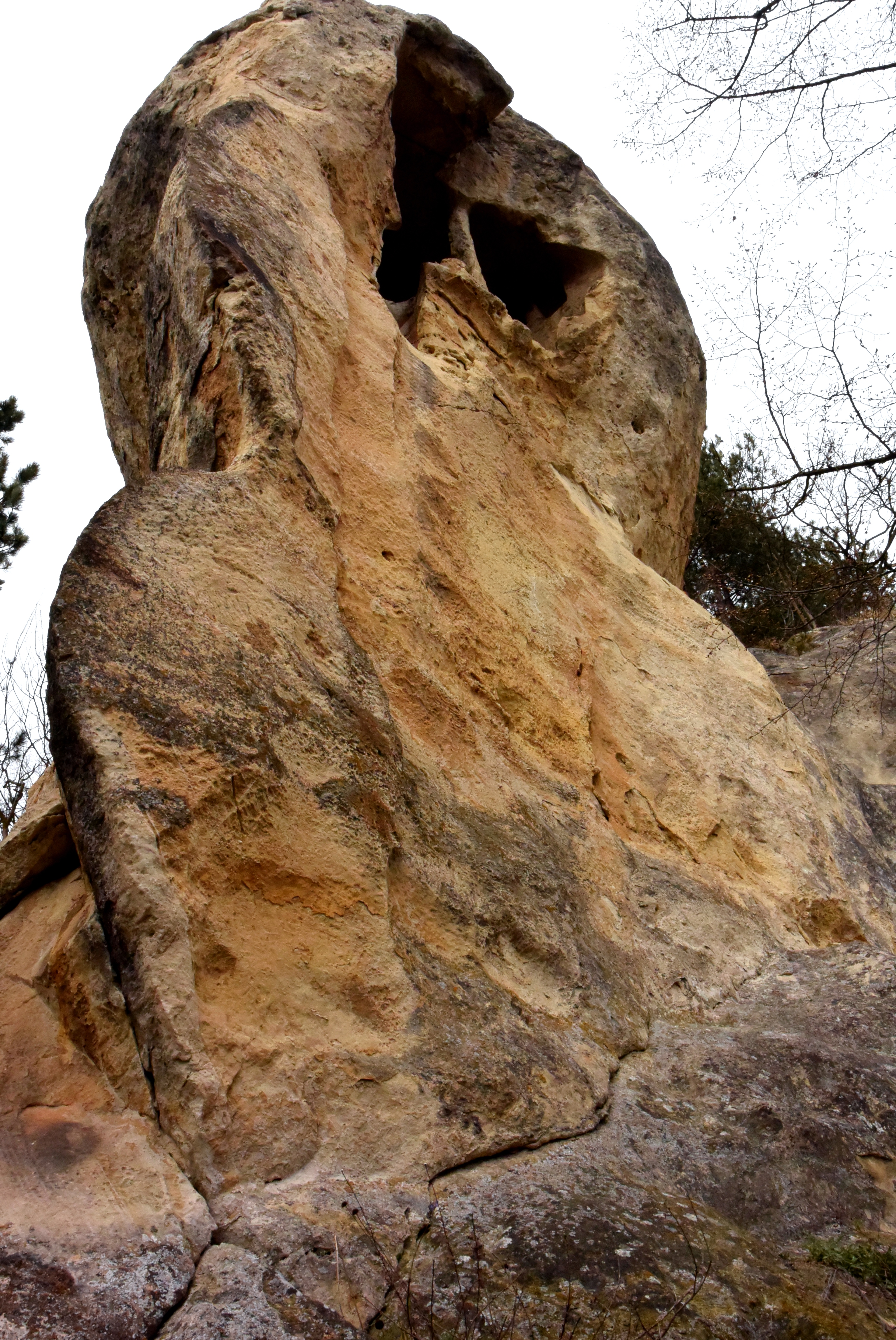 Шуменско плато